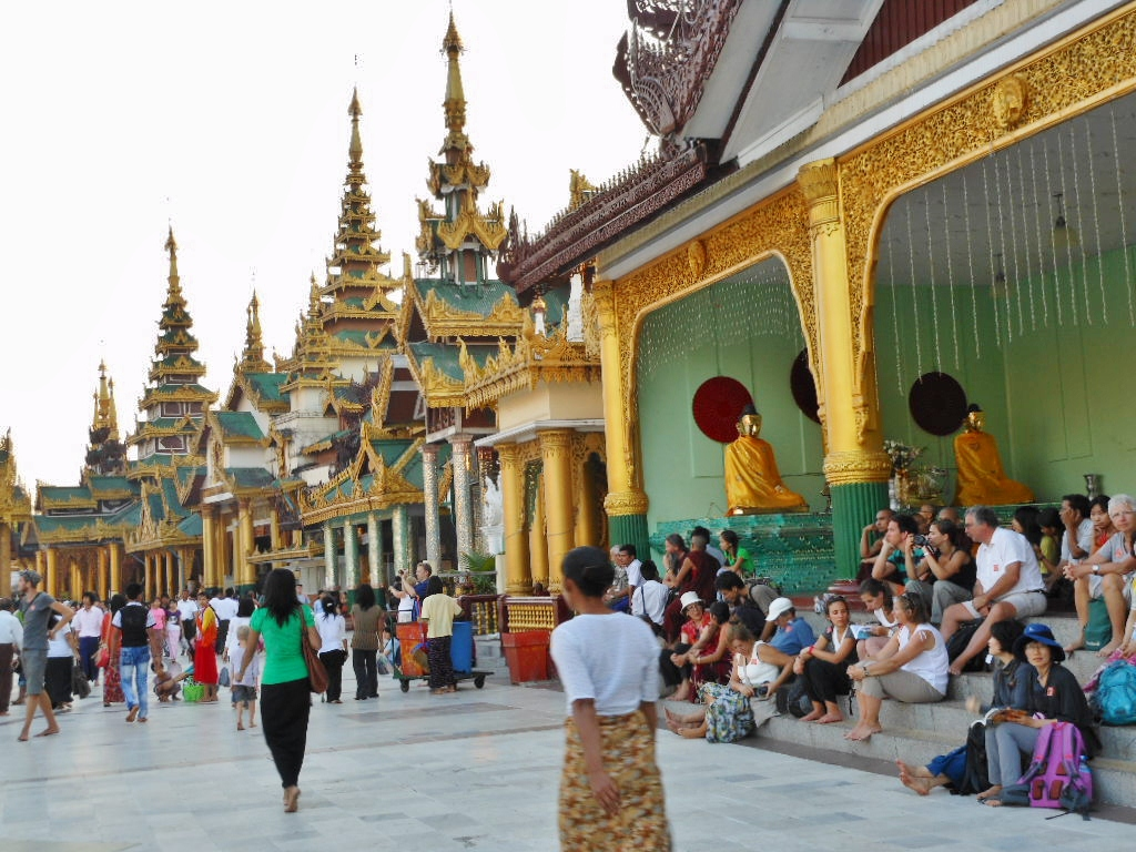 Settling In